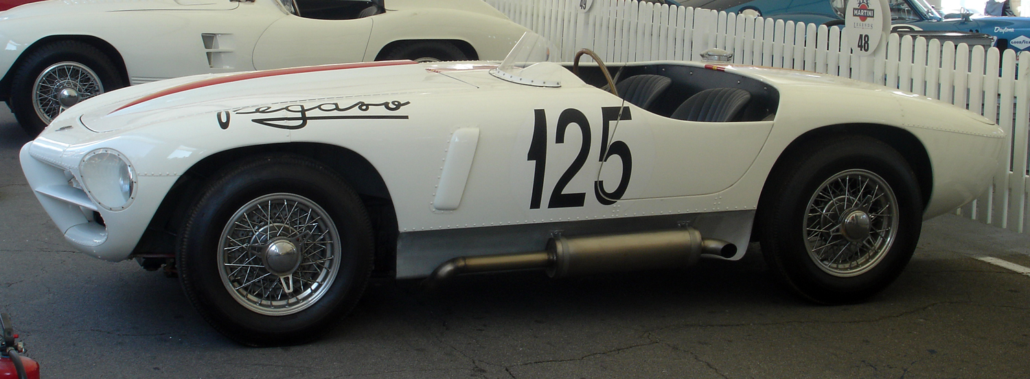 Pegaso Rabassada, exposat al festival Martini Legends (commemoració del 75 aniversari del Circuit de Montjuïc)